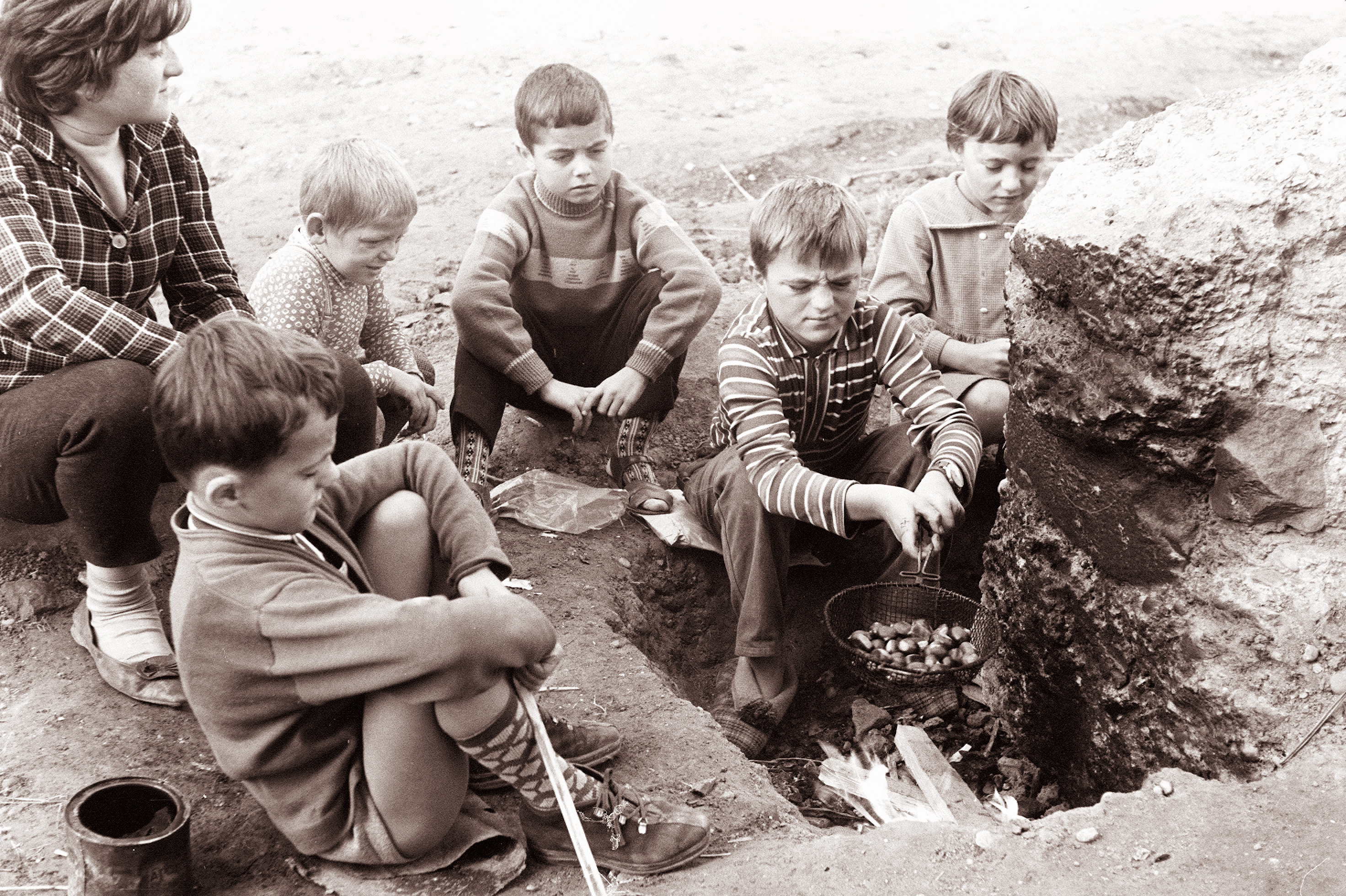 Otroci pečejo kostanj v Mariboru